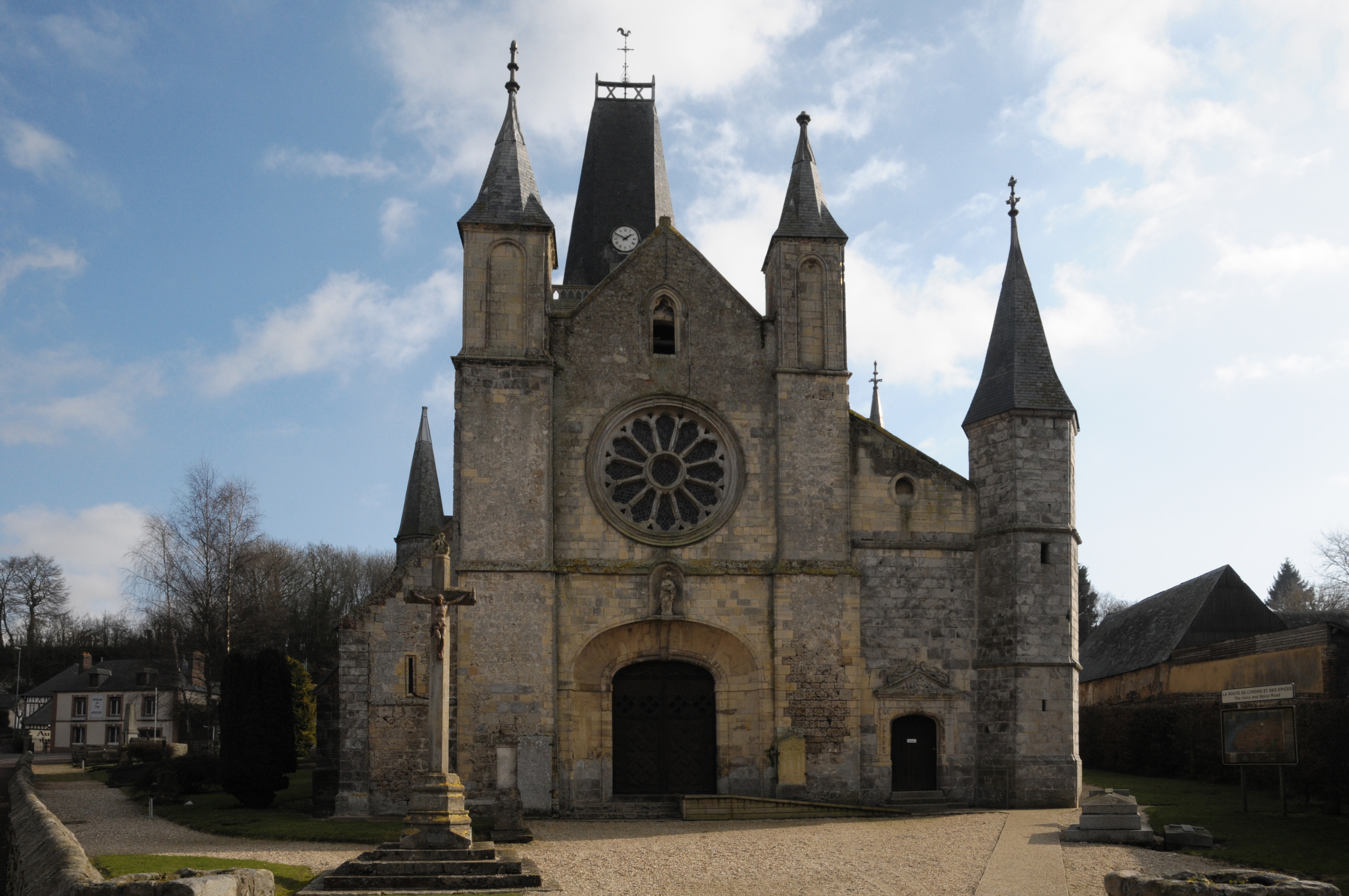 église Notre-Dame du Bourg-Dun.